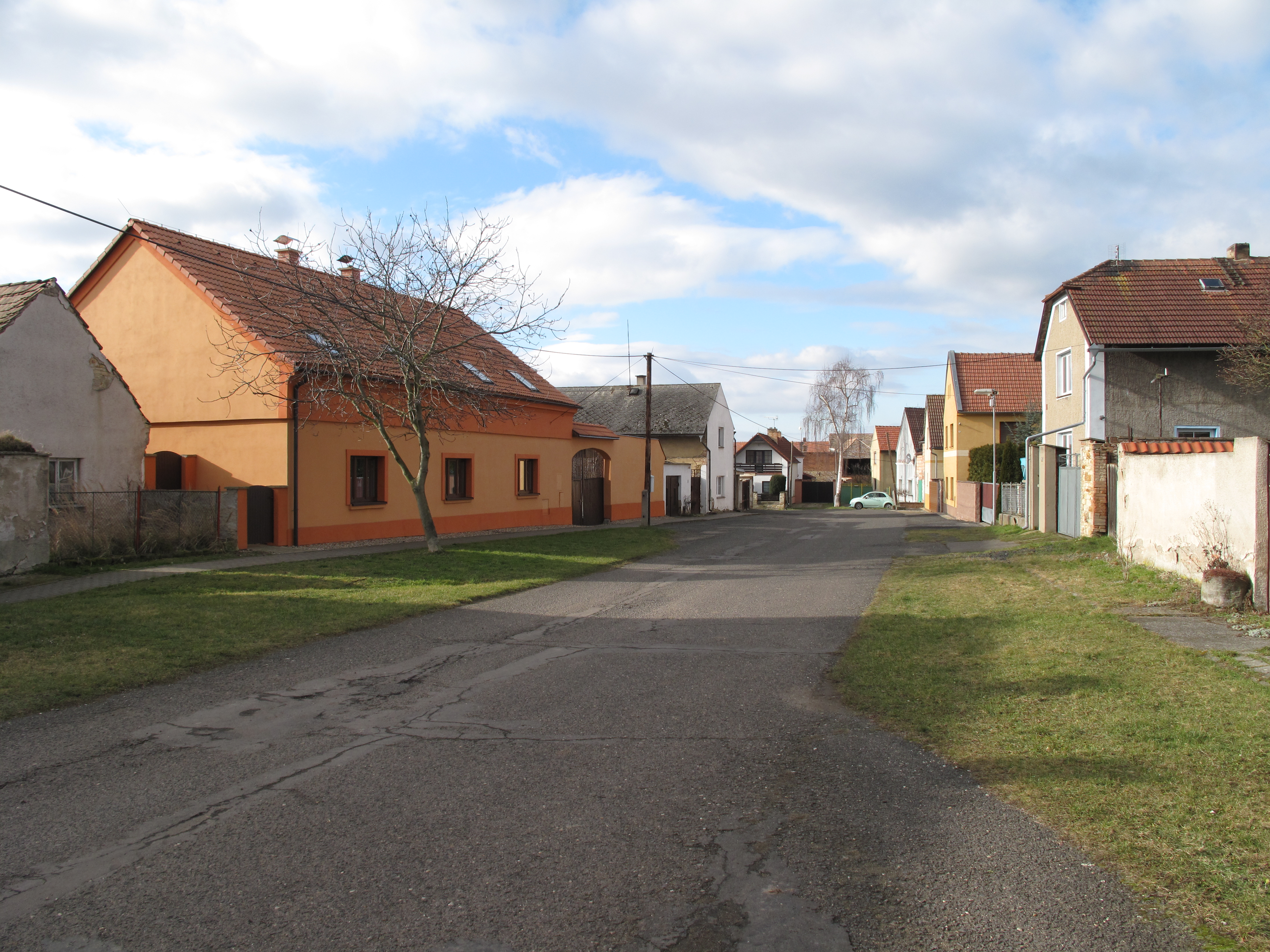 Ulice v Pohořicích. Okres Litoměřice, Česká republika.